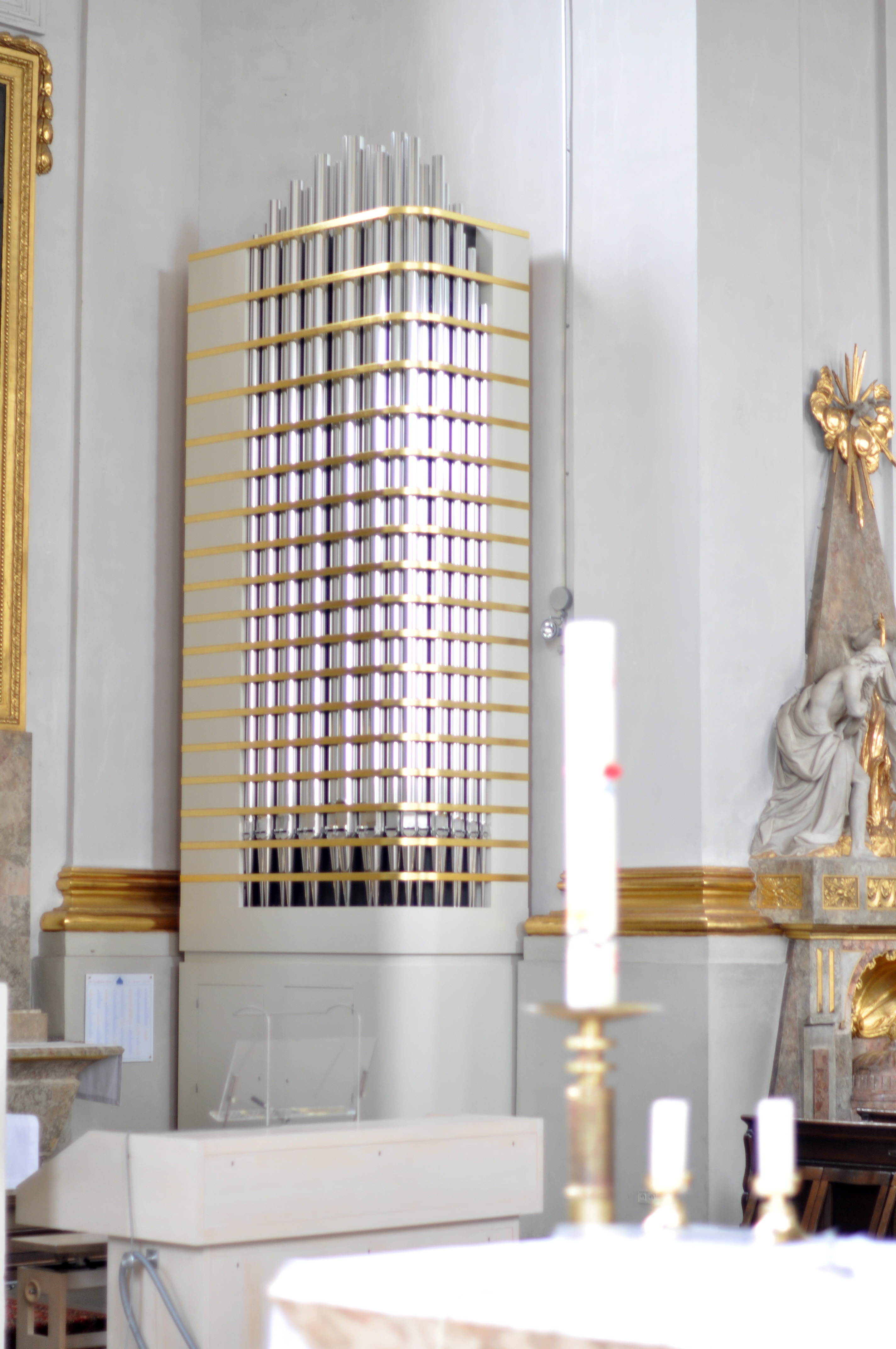 Hechingen